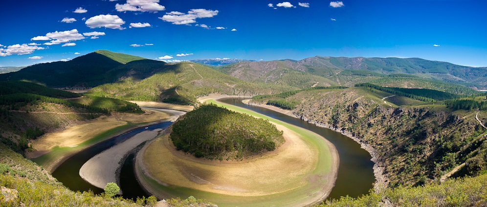 Meandro del Melero en el río Alagón, España. Límite municipal entre Caminomorisco (provincia de Cáceres) y Sotoserrano (provincia de Salamanca).